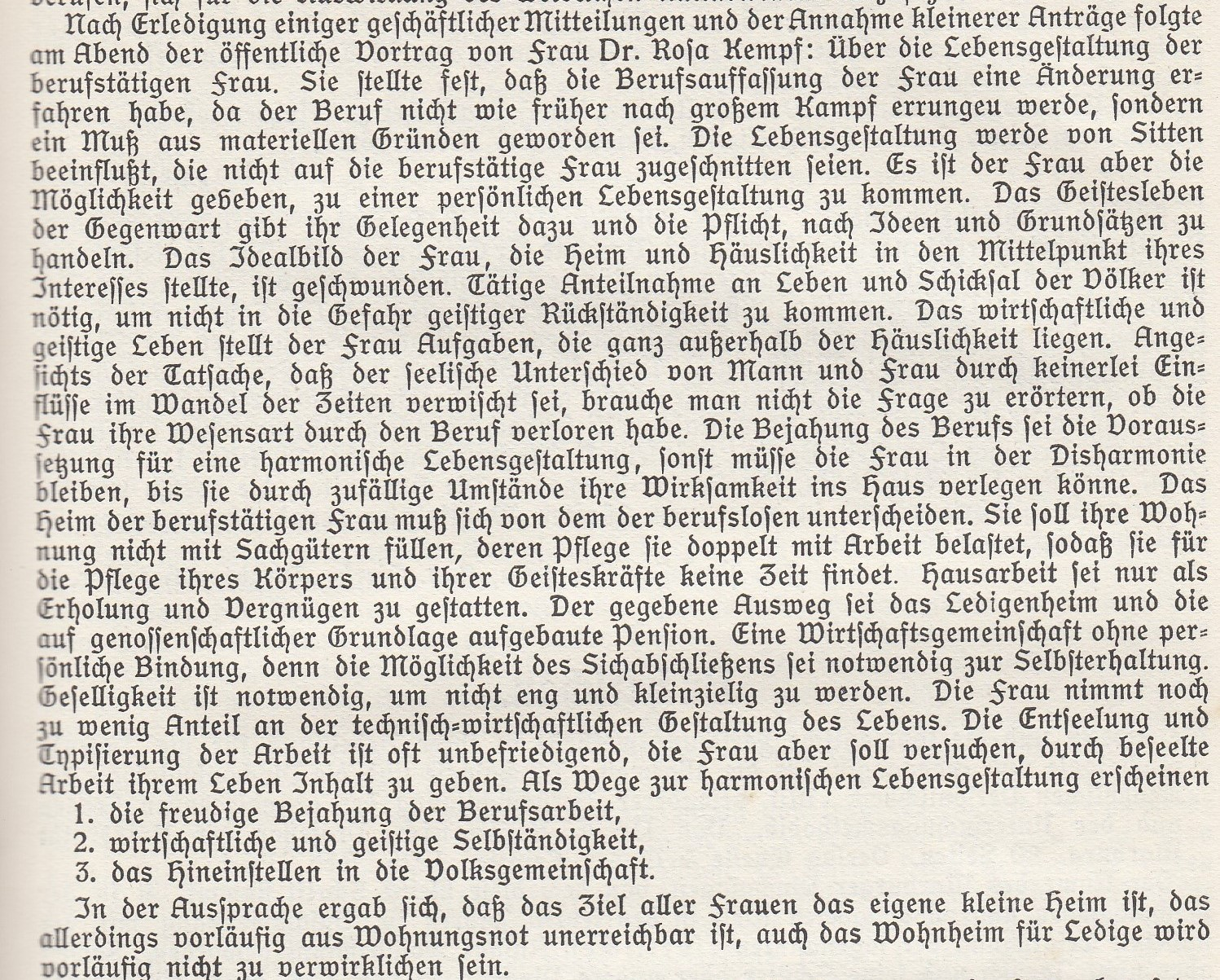 Vortrag von Rosa Kempf 1925 in Dresden